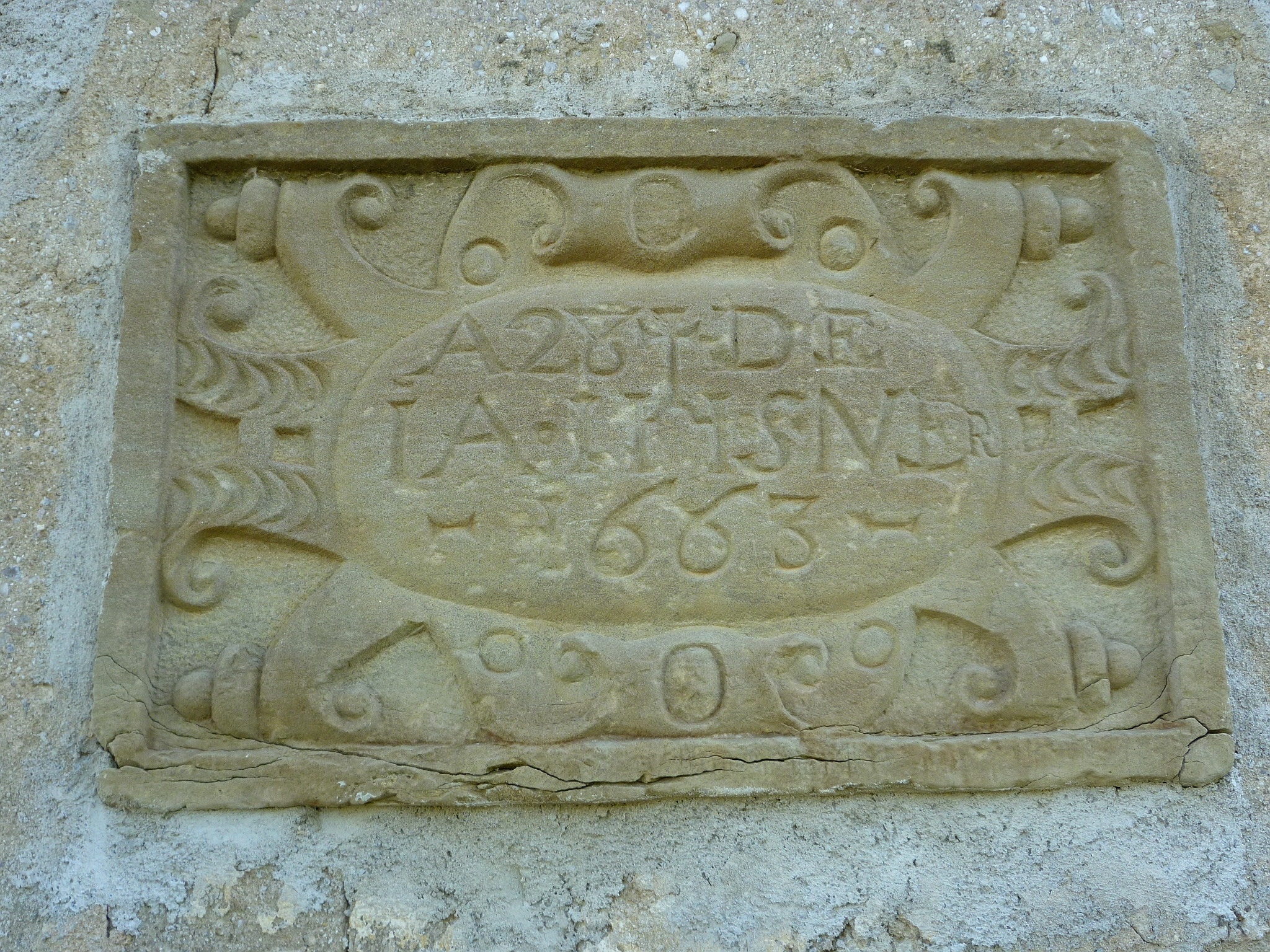 Santuari de Santa Maria d'Ivorra (Ivorra)